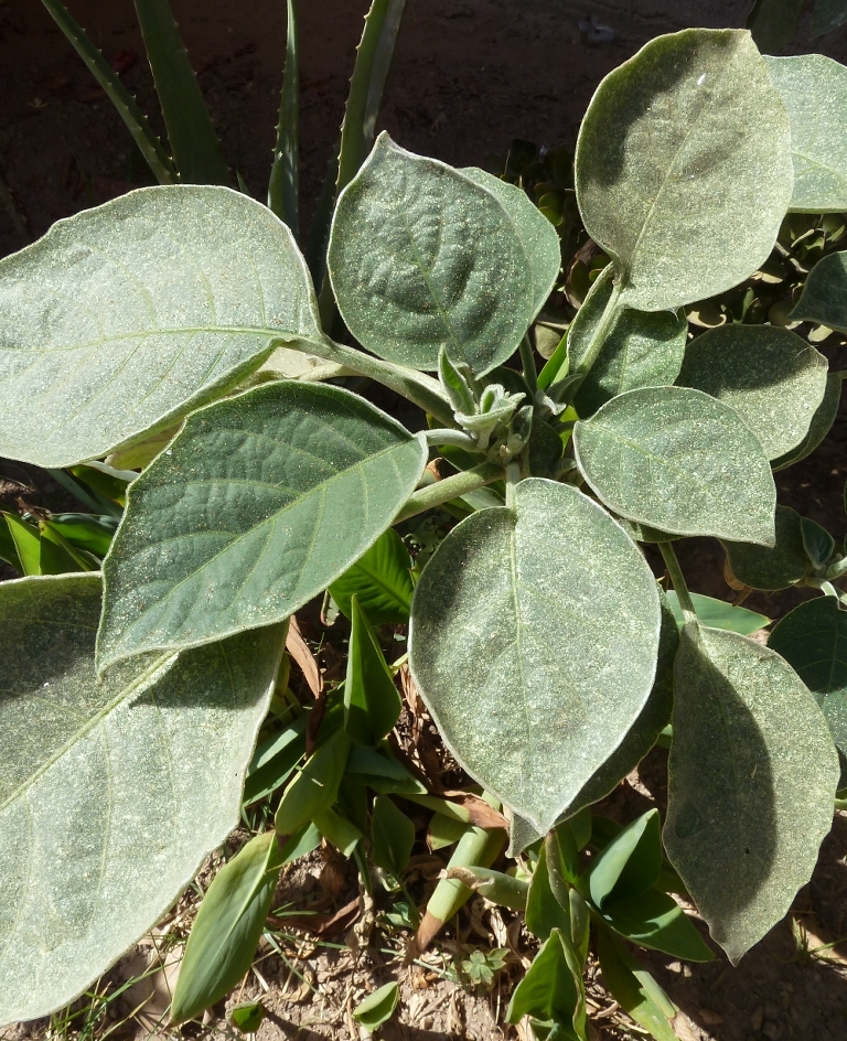 Brugmansia arborea (Árbol de las trompetas) : hojas de limbos asimétricos - Calle del Rey Carlos III (seto ornamental cultivado), Águilas (Murcia, España).